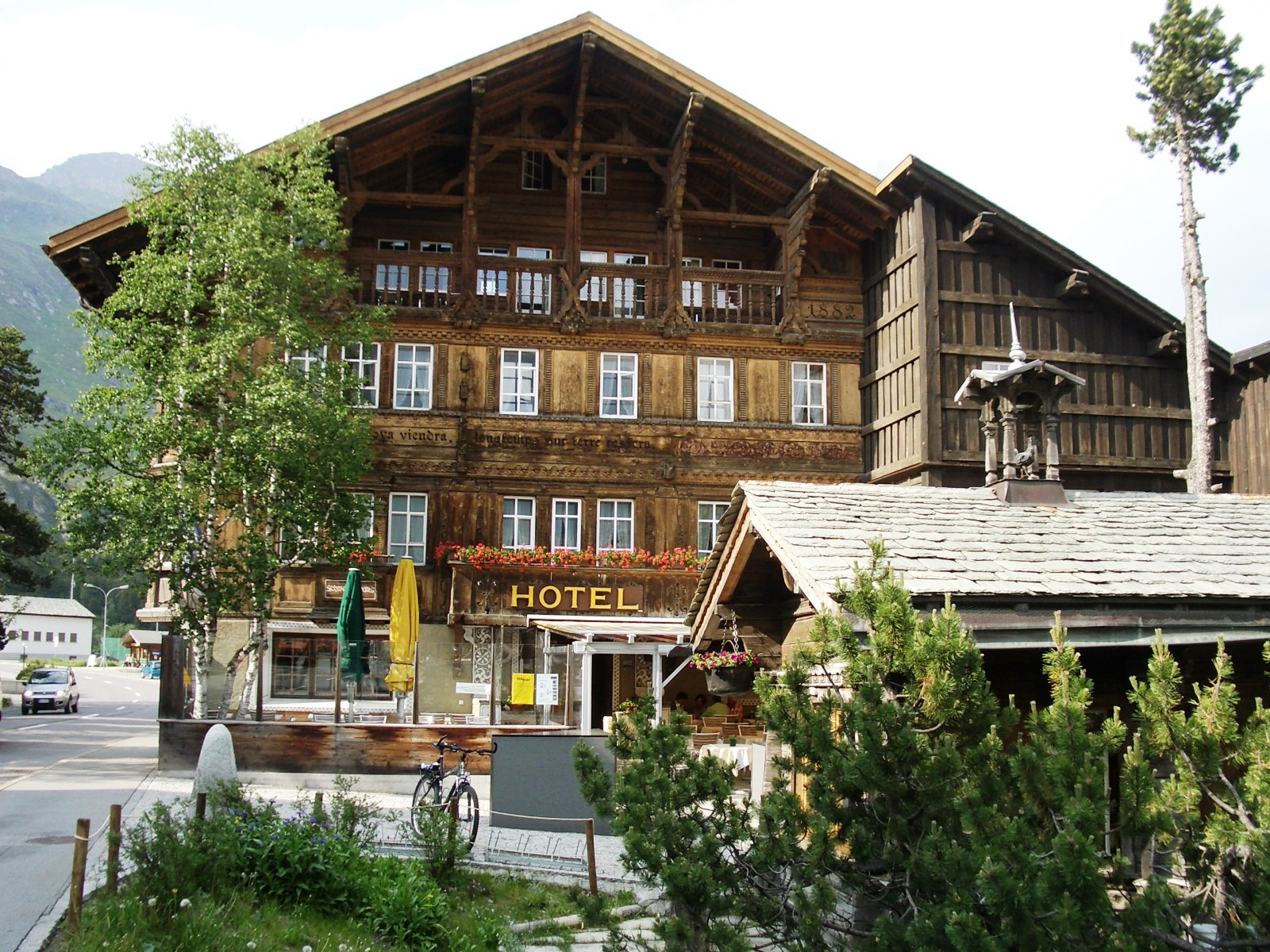 Hotel Schweizerhaus, Maloja GR, Schweiz